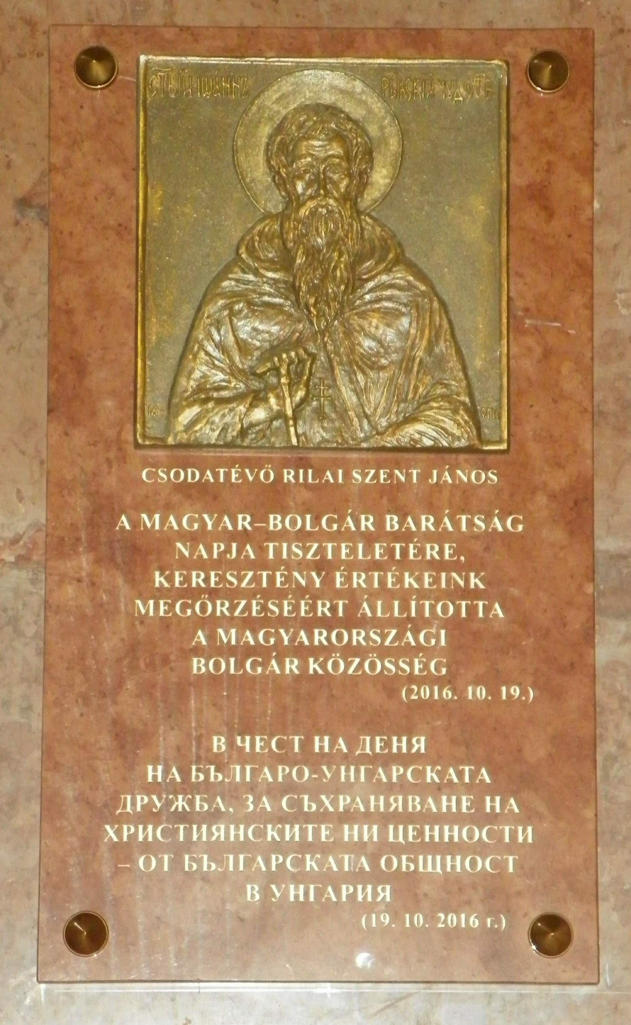 Kétnyelvű emléktábla a bolgár-magyar barátság tiszteletére, felavatva 2016. október 19. (wikipedia)